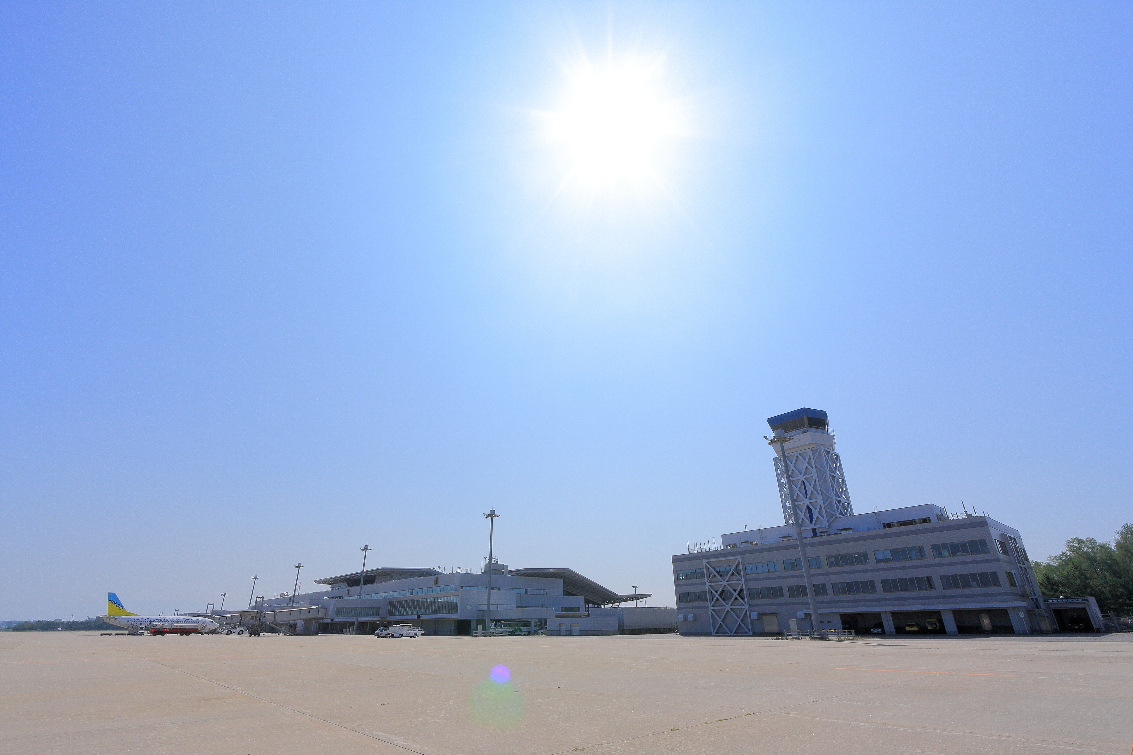 新潟空港をエプロンから望む